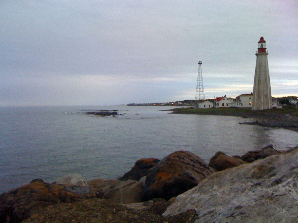 Le troisième phare de Pointe-au-Père, construit en 1909 et désaffecté en 1975 avec, en arrière-plan, la tour à claire-voie automatisée (quatrième phare) qui l'a remplacé.